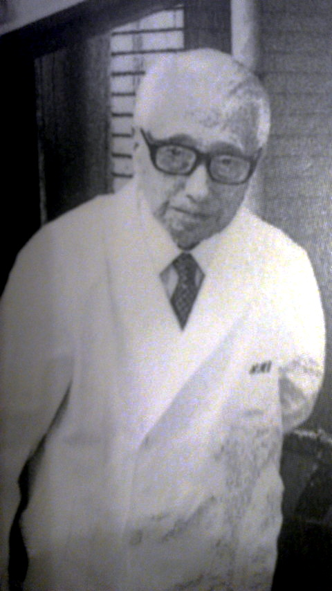 丸山千里医学博士